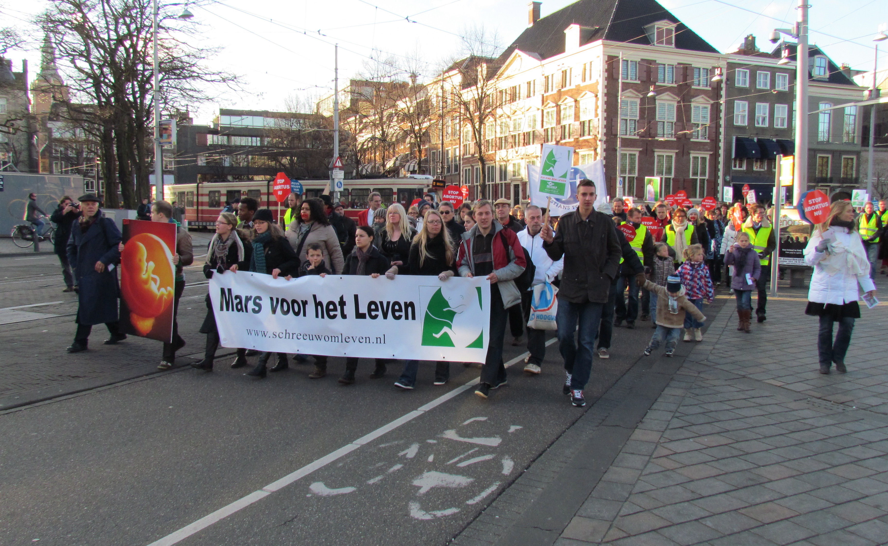 'Mars voor het Leven', manifestatie tegen abortus, georganiseerd door Schreeuw om Leven. Buitenhof, Den Haag